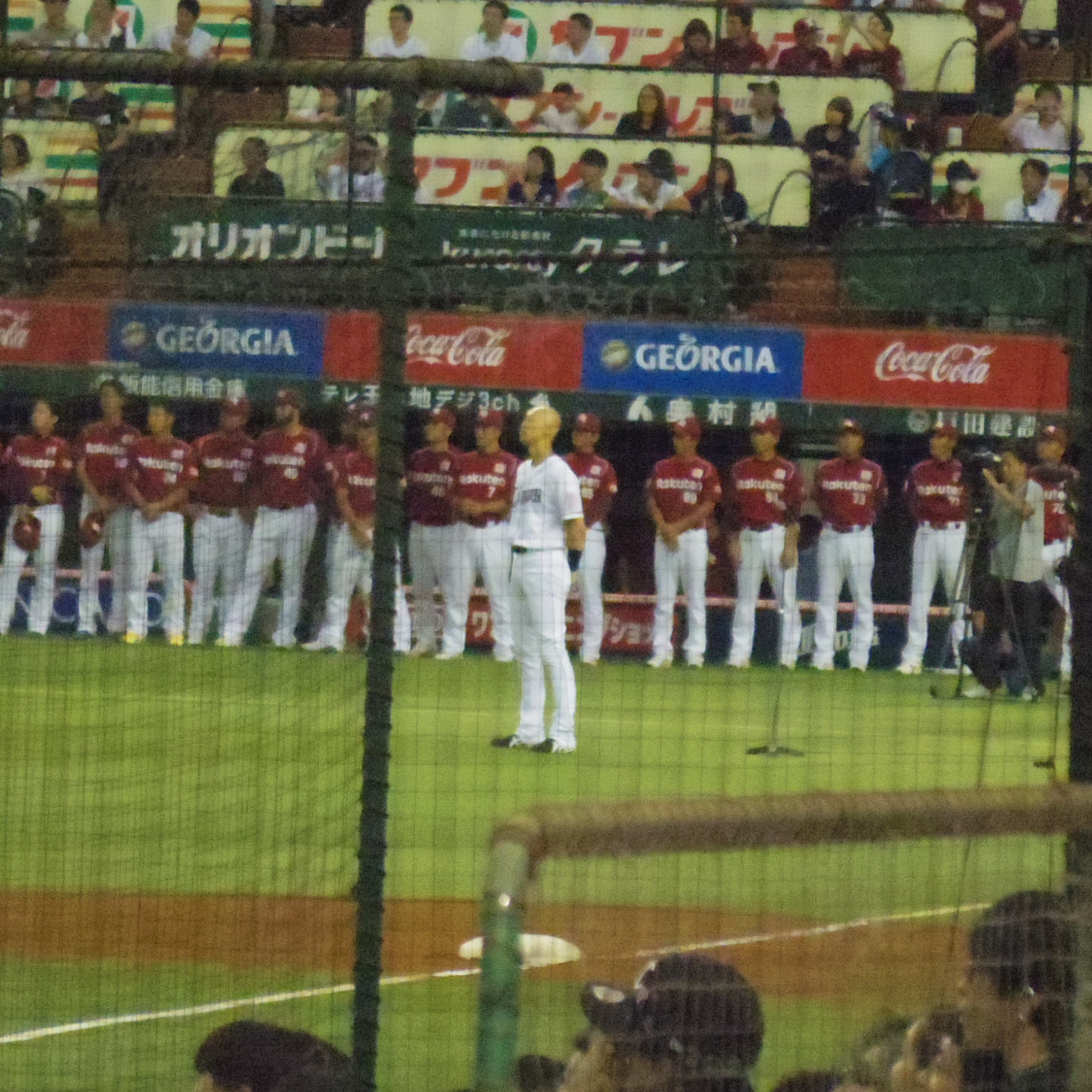 埼玉西武ライオンズ・森本稀哲外野手の引退セレモニー(2015年9月27日、西武プリンスドームで行われた「西武×楽天」戦試合終了後）にて。後ろに整列するのは東北楽天ゴールデンイーグルスナイン。